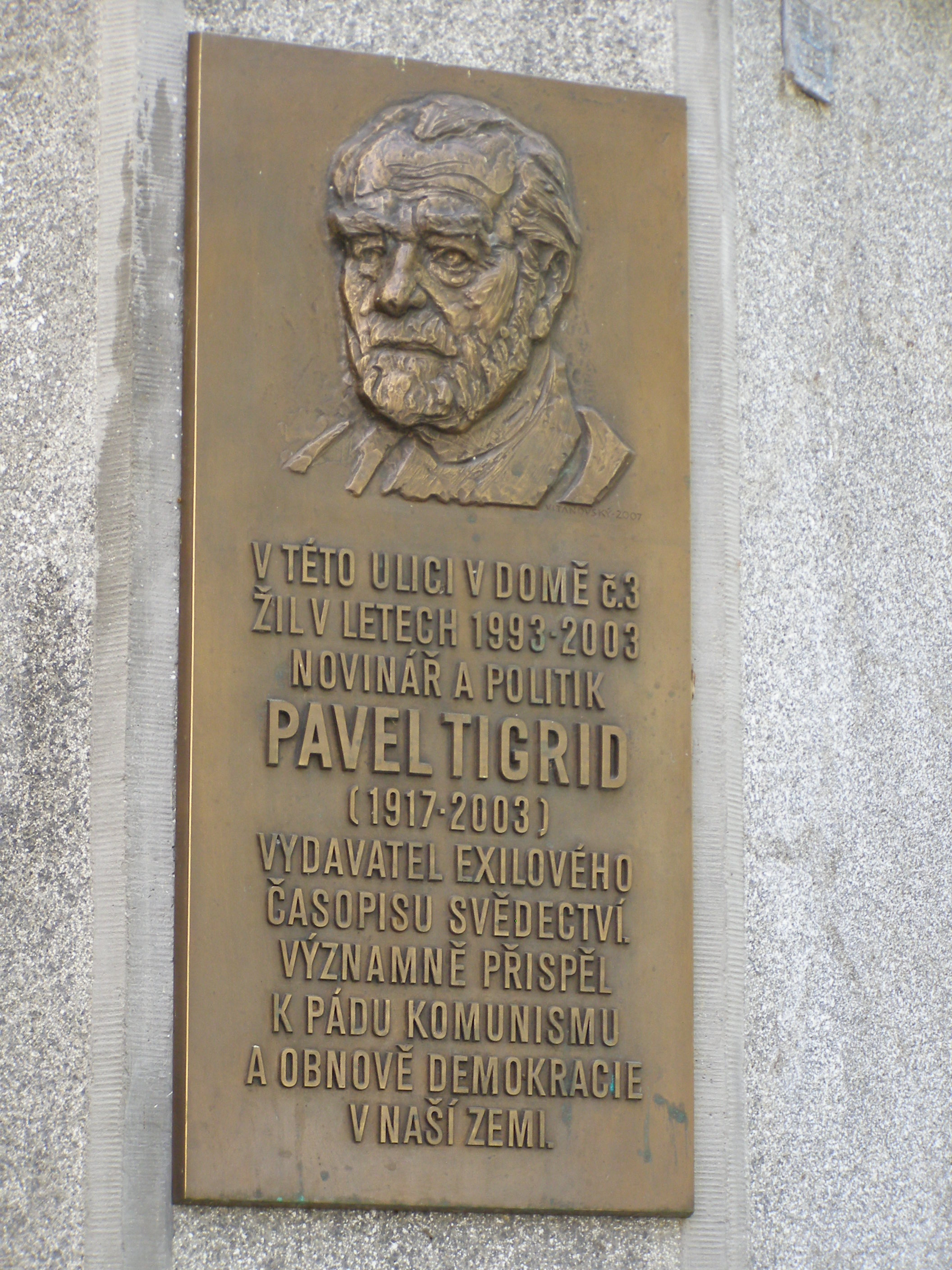 Gedenktafel für Pavel Tigrid, U starého hřbitova 3/248, Prag 1, wo er 1993-2003 lebte